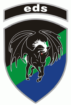 7 Eskadra Działań Specjalnych – oznaka rozpoznawcza – 2012, Polska.